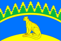 Флаг сельского поселения имени М. Горького, Краснодарский край, Россия.